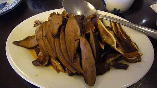 Lou mei dishLou mei dish